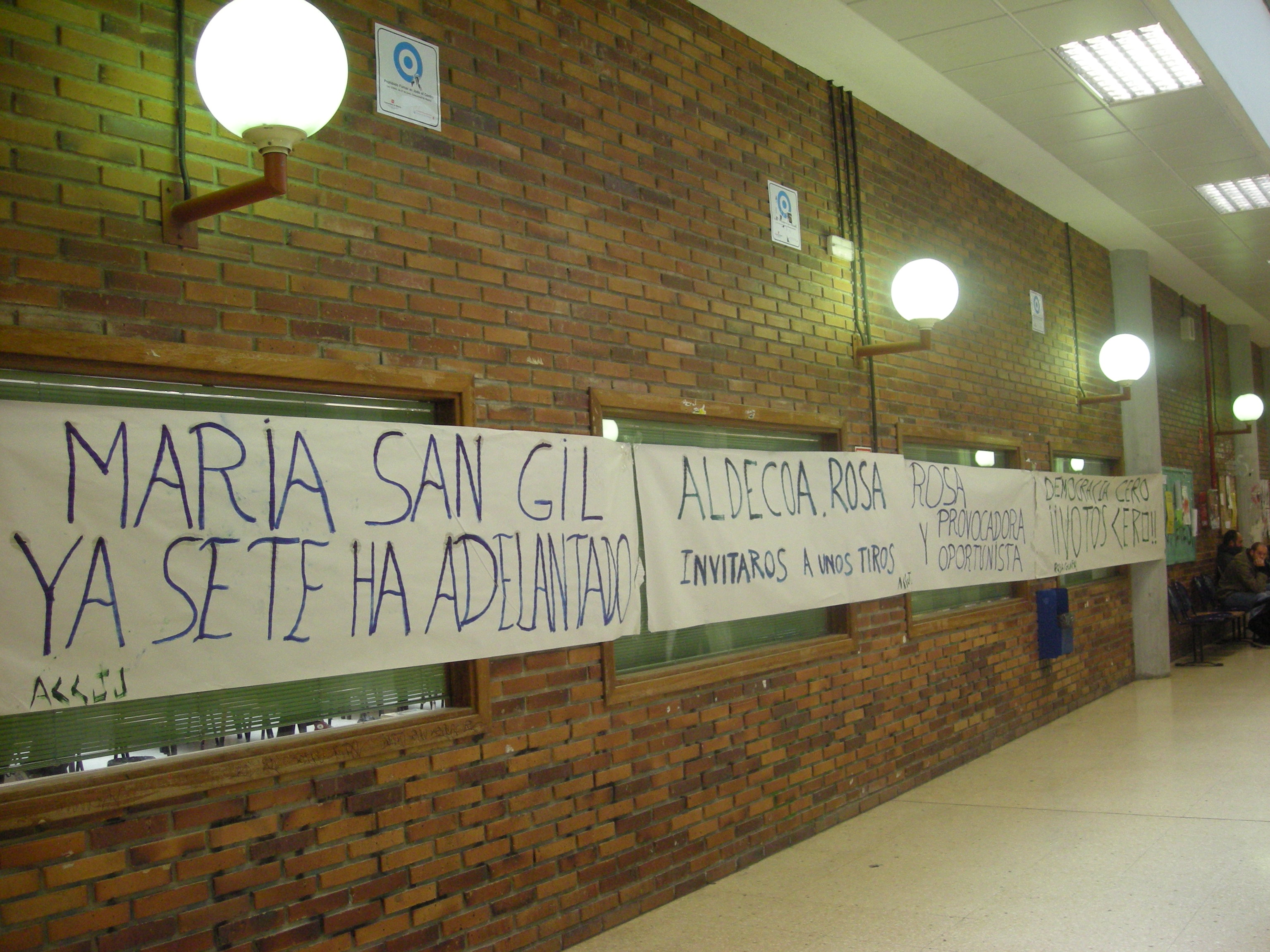 Pancartas en la Facultad de Politicas de la UCM de Madrid, en el intento de boicotear un acto de Rosa Diez